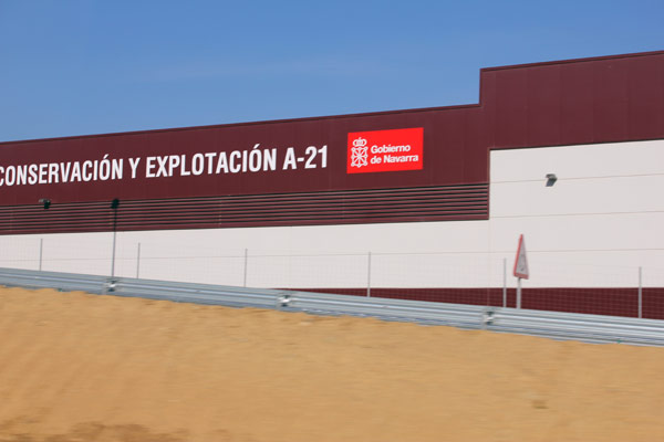 Centro Conservación A-21